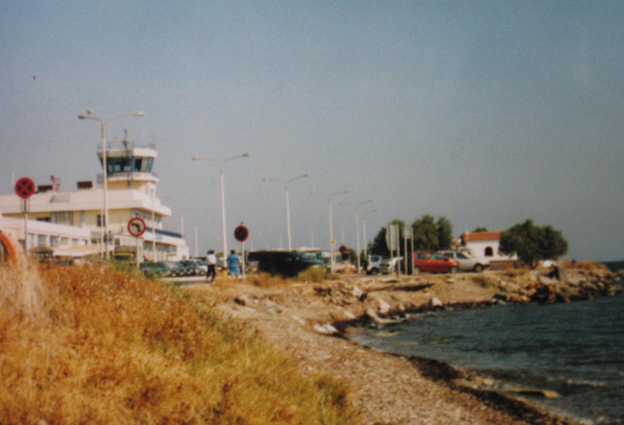 Mytilini_airport